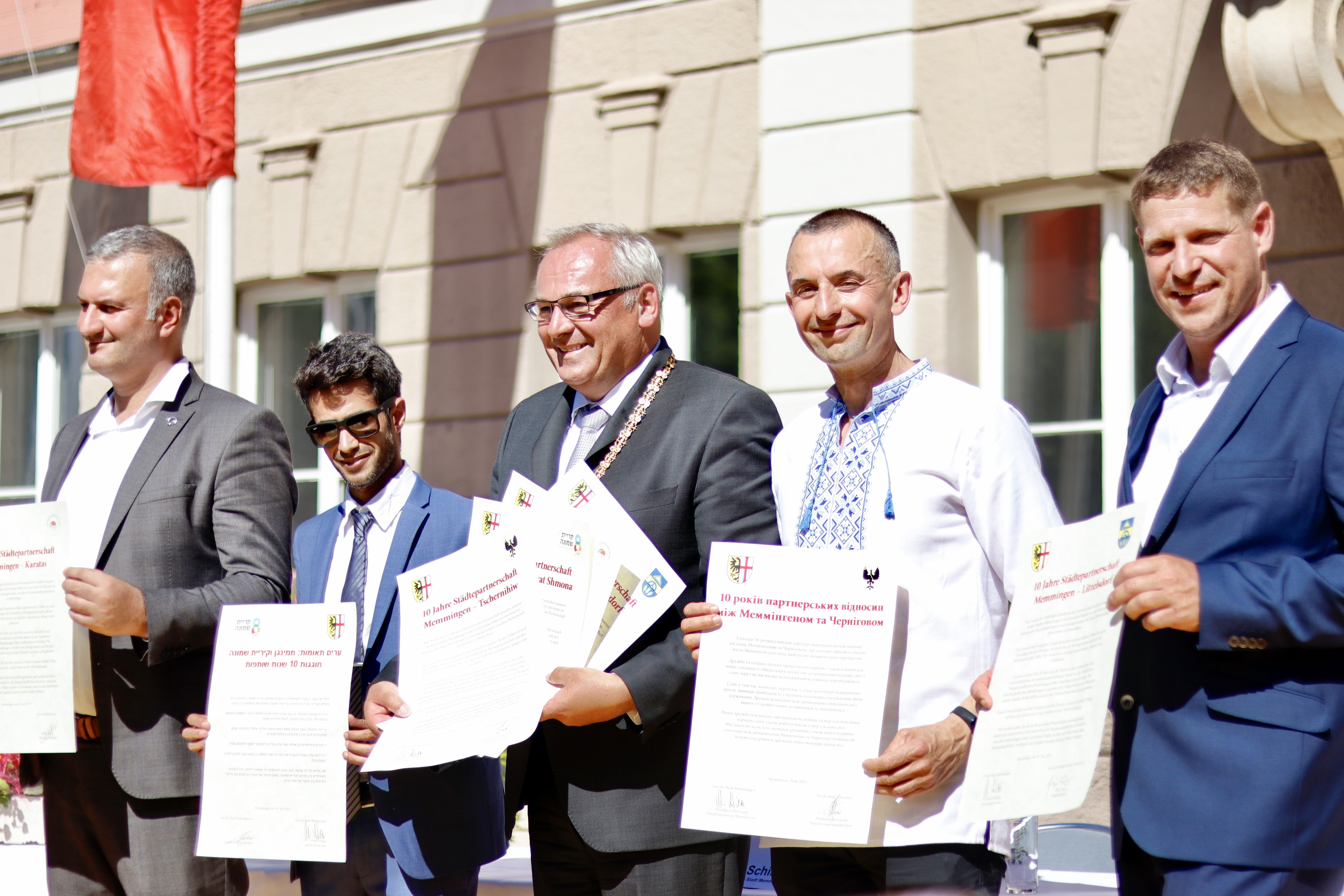 Die Vertreter der Partnerstädte aus v.l.n.r. Karatas (Türkei), Kiryat Shmona (Israel), Tschernihiw (Ukraine), Litzelsdorf (Österreich), mit dem Memminger Oberbürgermeister Manfred Schilder (mitte), beim Festakt zur Bekräftigung der 10-jährigen Städtepartnerschaften auf dem Memminger Marktplatz.